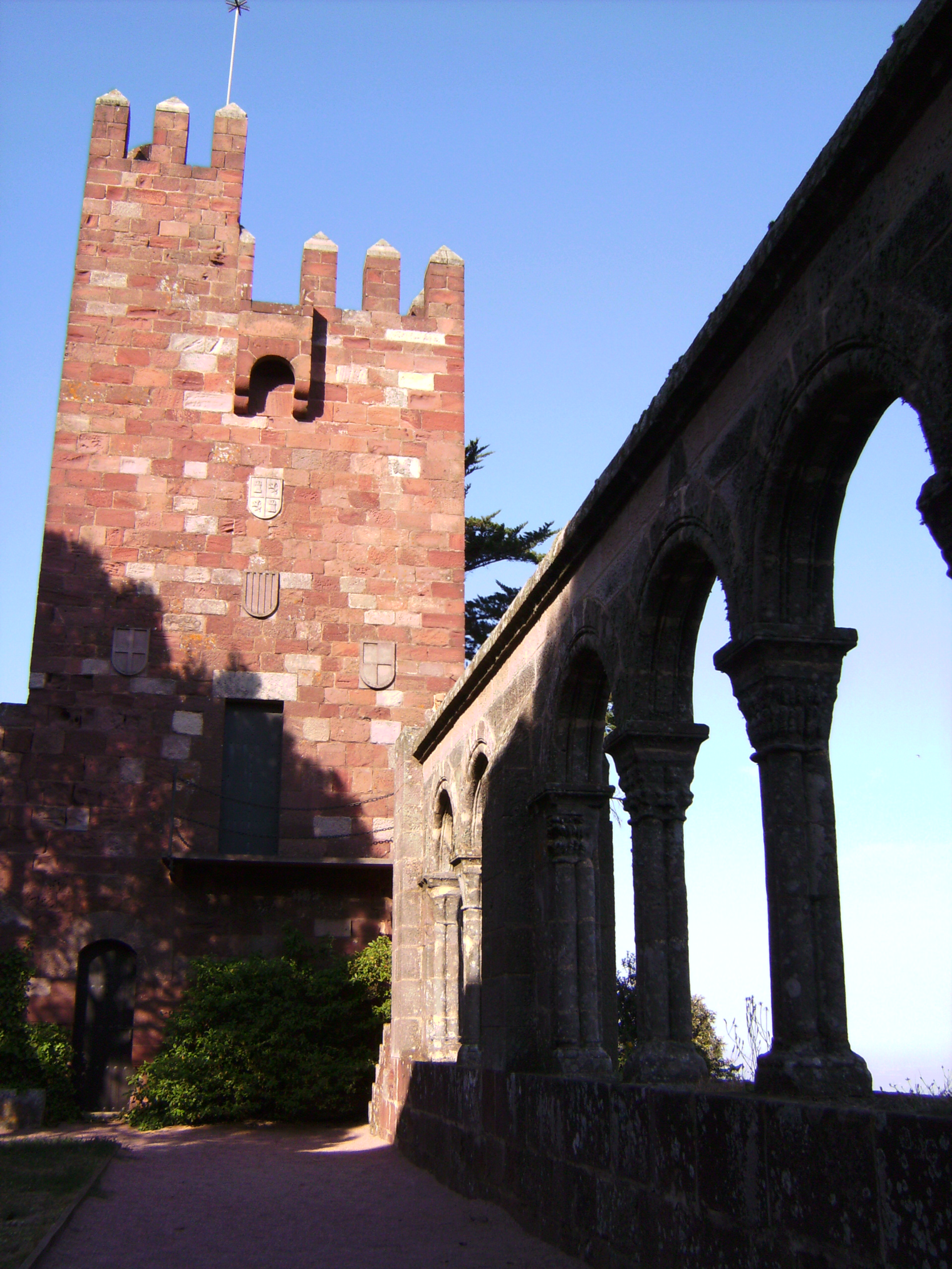 Castillo Monasterio de Sant Miquel d'Escornabou - Torre y Claustro